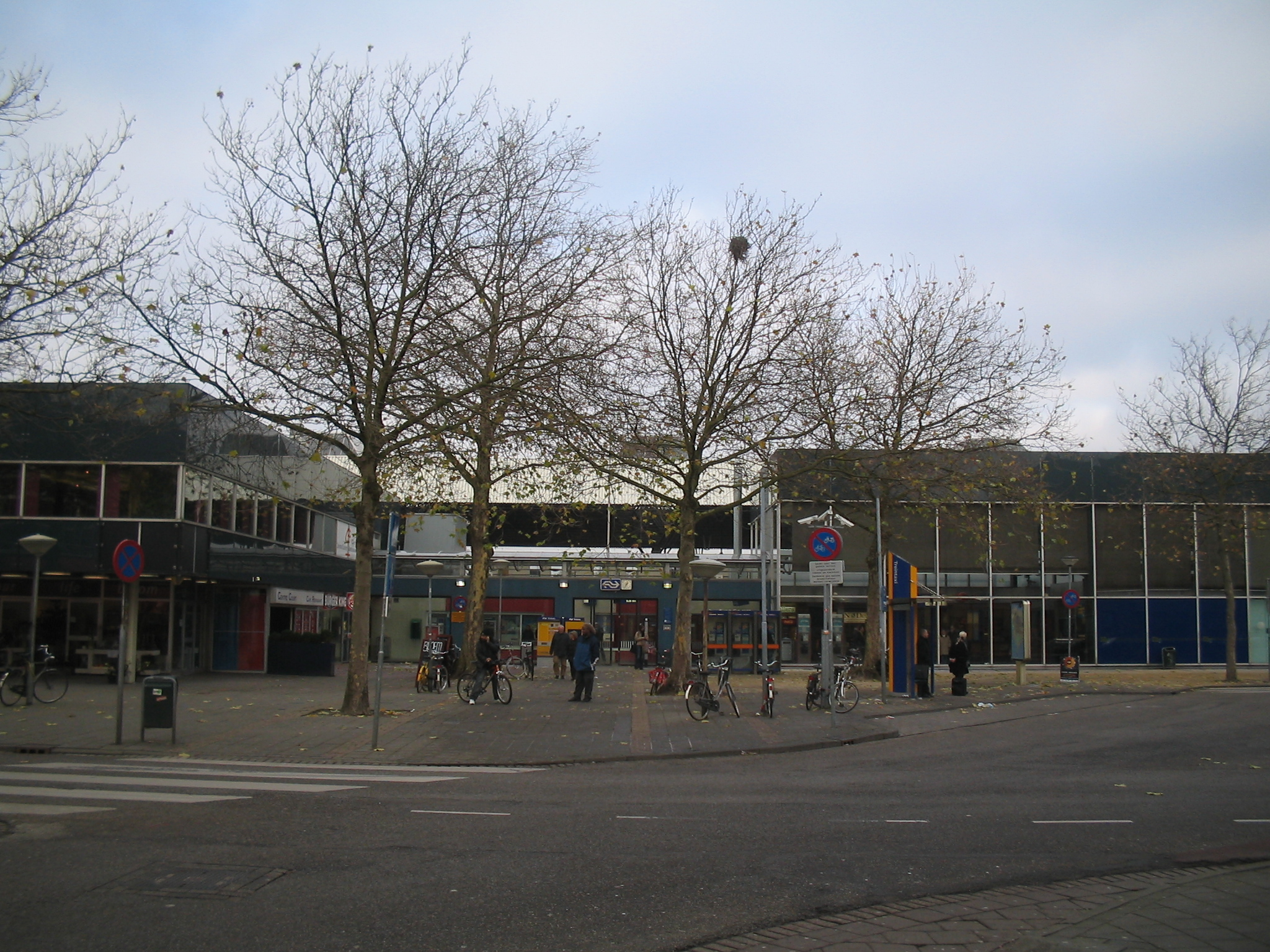 Centrumkant voormalige station Breda , station, dec. 2005